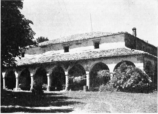 Zemono pri Vipavi.